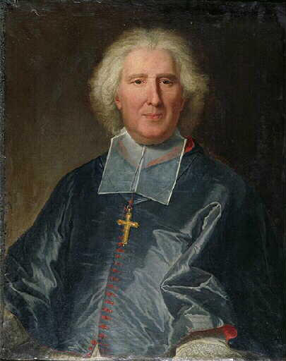 Portrait de l'évêque Jean Bouhier